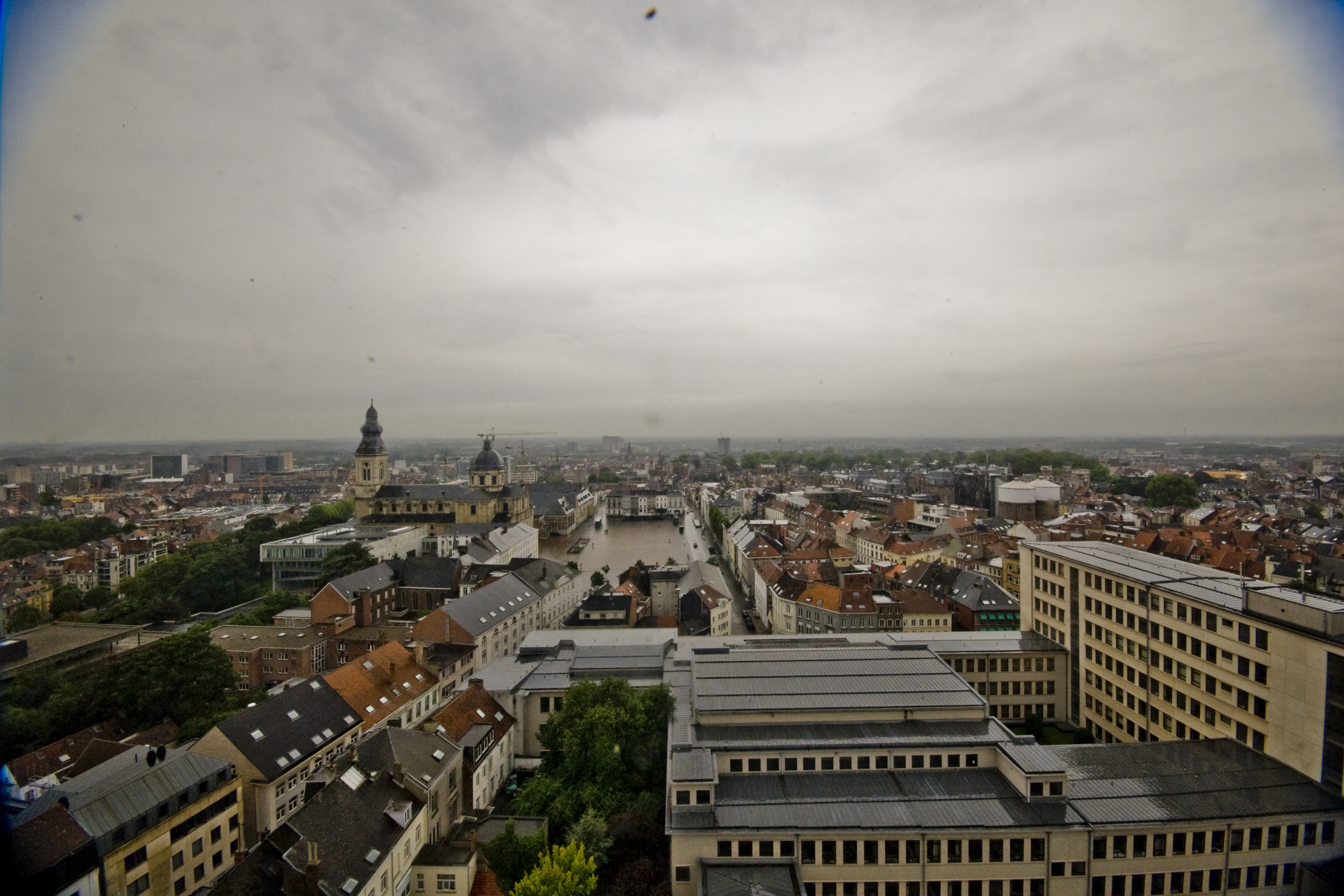 Foto van de Blandijn (gebouw van de Universiteit Gent). Foto gedoneerd door UGentMemorie; fotografie Pieter Morlion